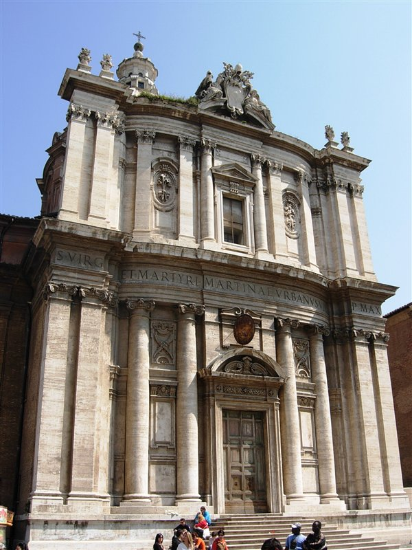 Santi Luca e Martina, chiesa di Roma, facciata